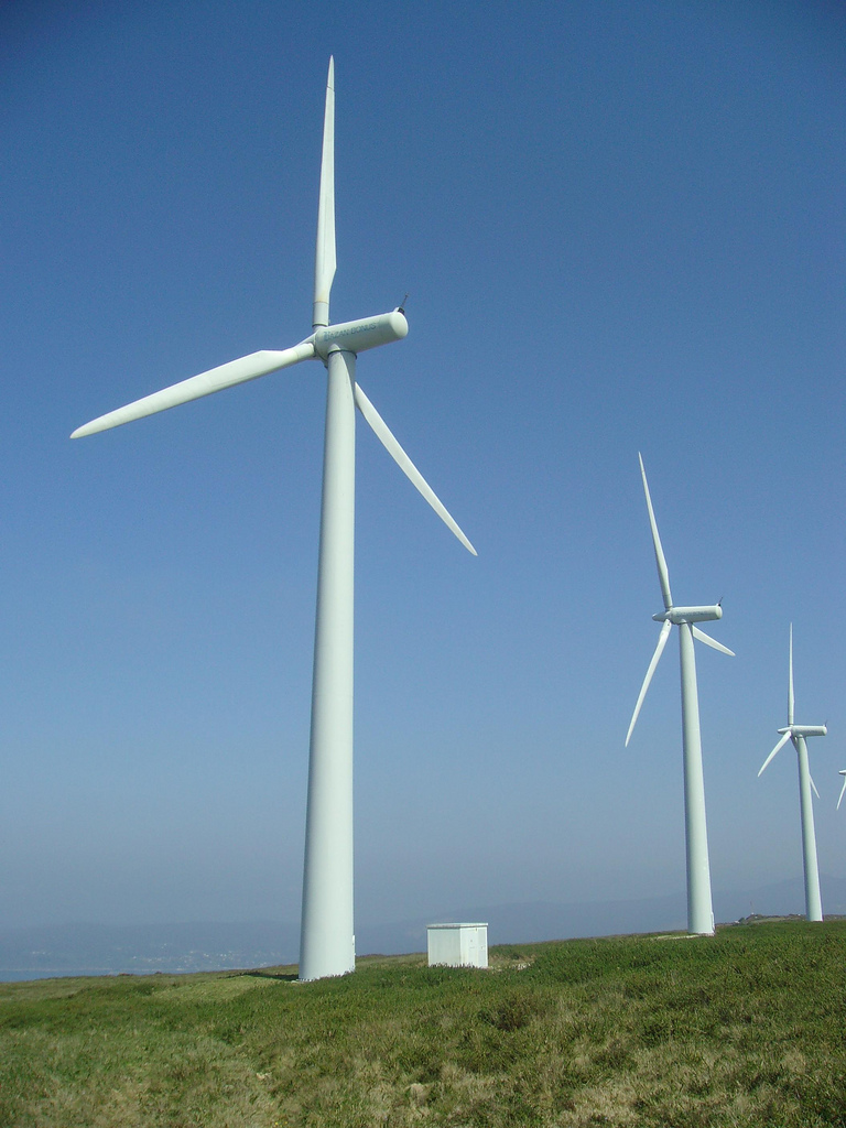 Aerogeneradores Bazan Bonus Mk. IV situados en el Parque éolico de Vicedo, a caballo entre el límite de los municipios de Viveiro y Vicedo (provincia de Lugo, España)